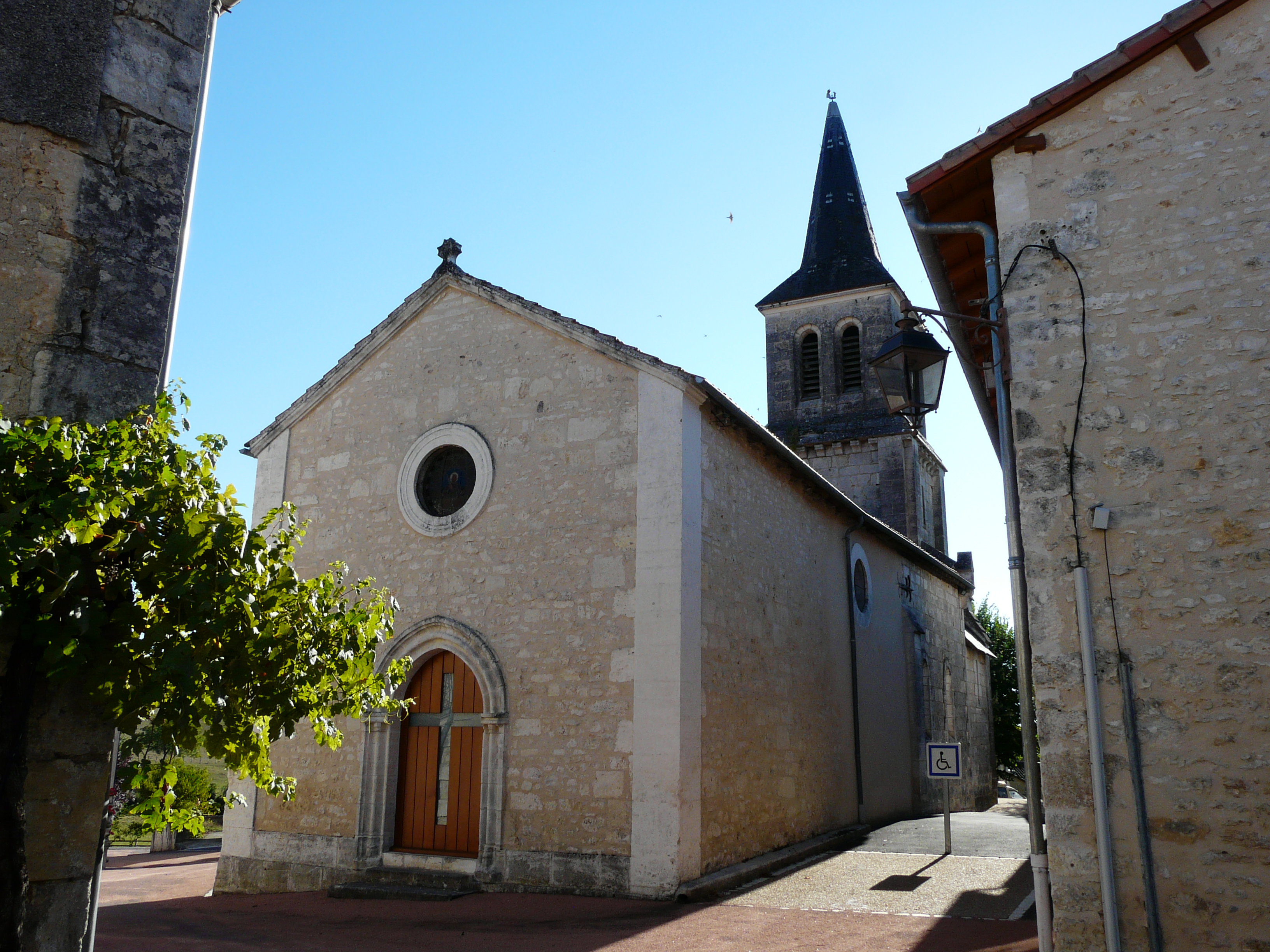 L'église Saint-Maurice de Vaunac, Dordogne, France.